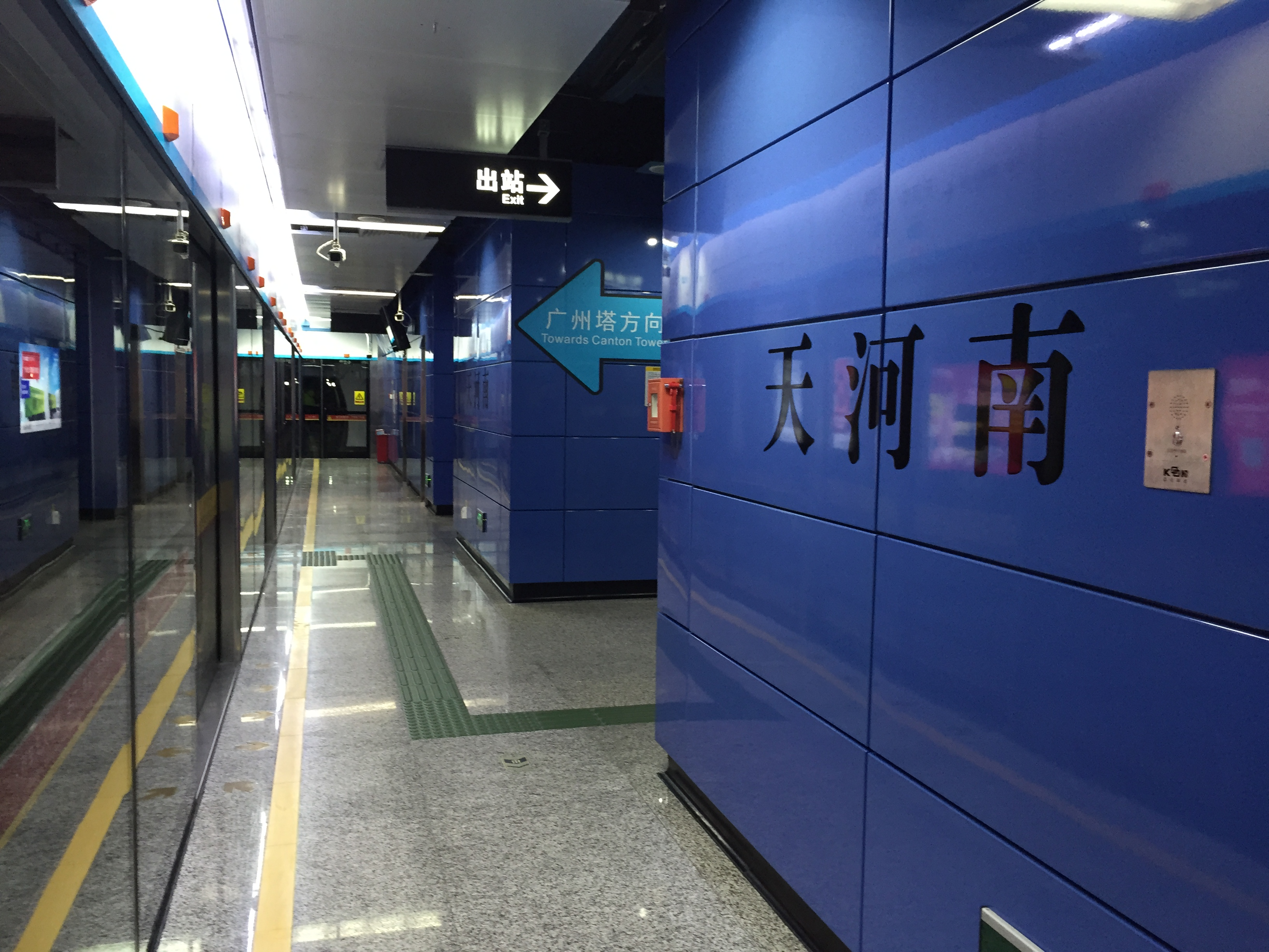 广州地铁天河南站